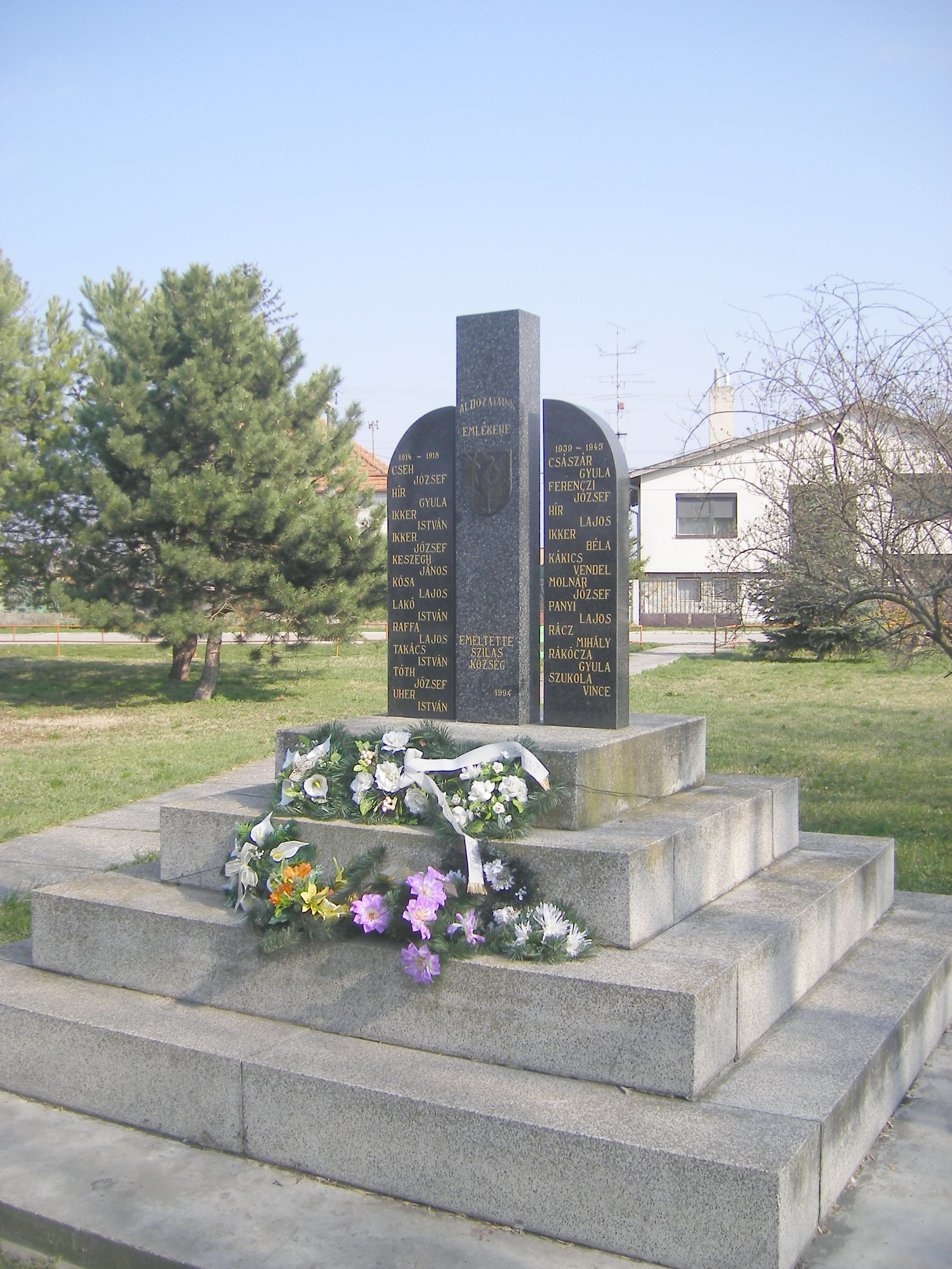 Szilas - a két világháború áldozatainak emlékműve